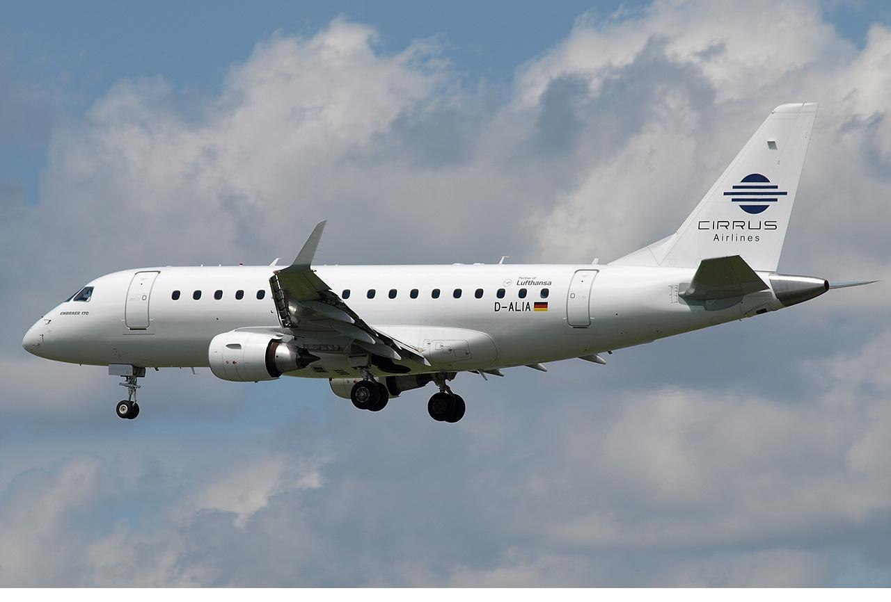 Cette photo à été prise le 12 mai 2006 à Francfort en Allemagne. Je suis le photographe : Louisdefunes